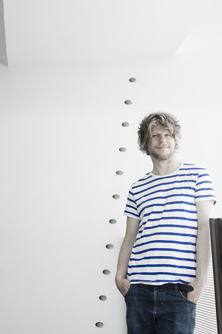 Artist Jacob Dahlgren in Kiasma 2013, taiteilija Jacob Dahlgren Kiasmassa. Hänellä on yllään sinivalkoinen taideteos nimeltä Abstract Painting nr 425.